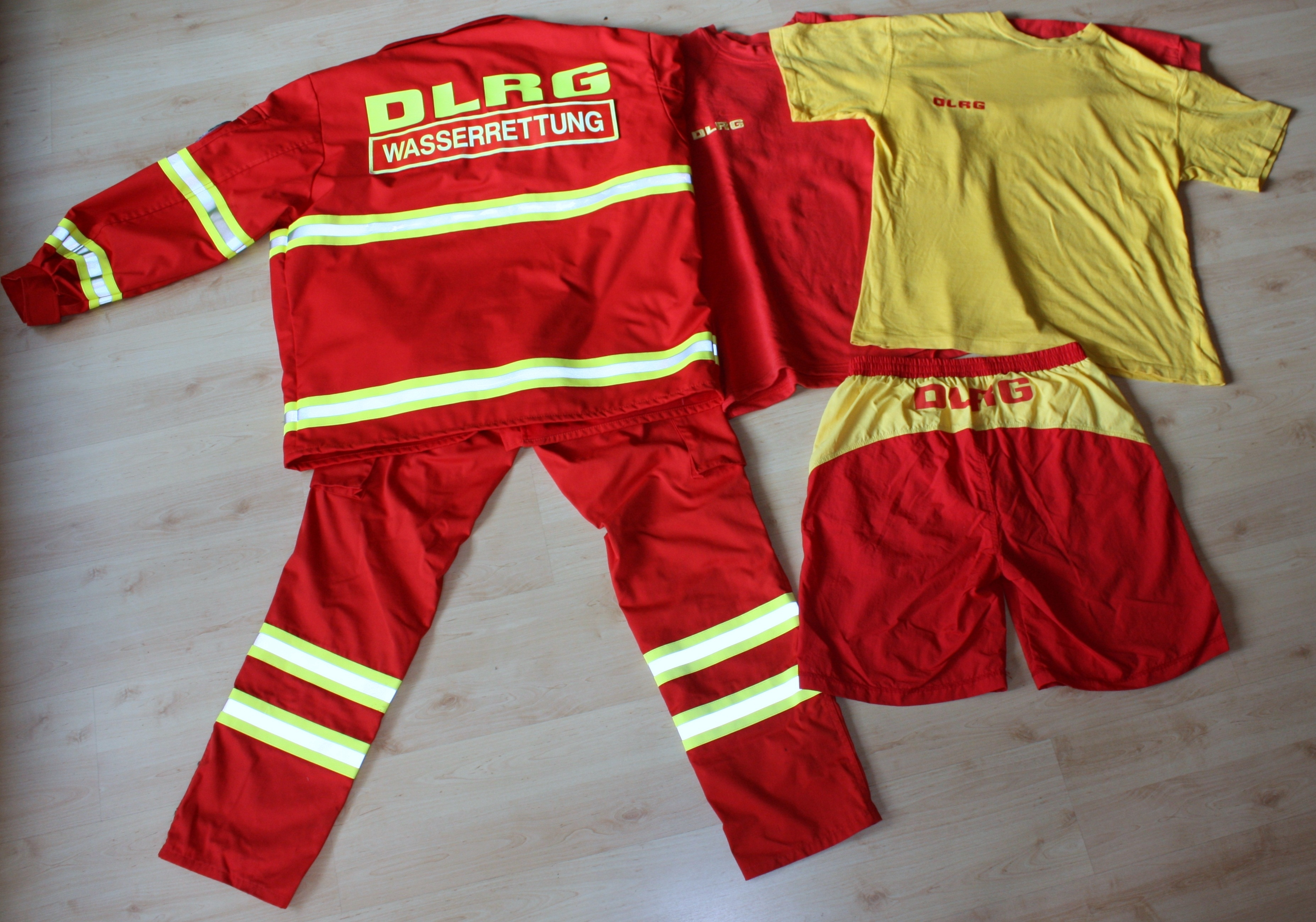 DLRG Einsatzkleidung nach Corporate Design 2010